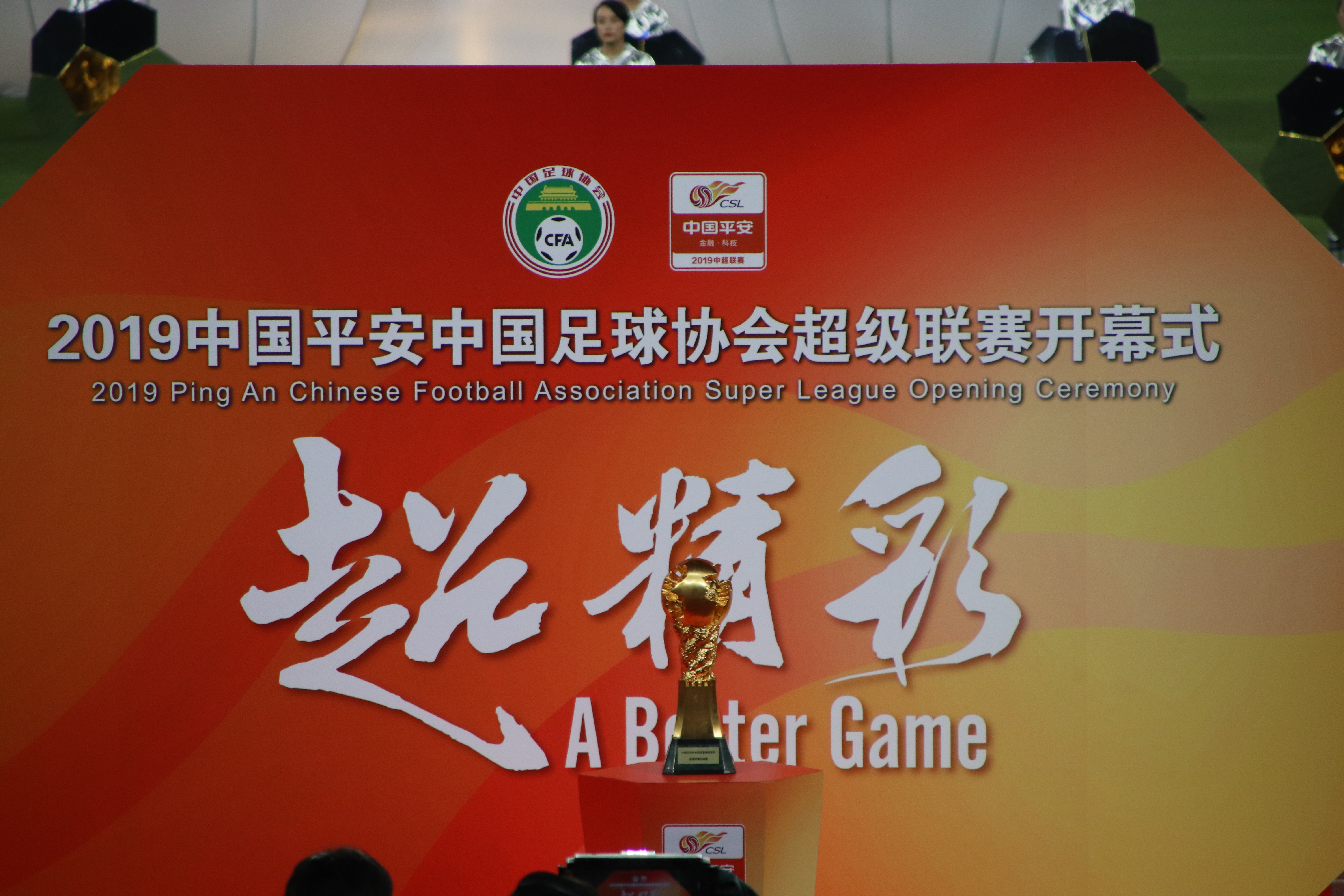 中文（中国大陆）: 2019中国平安中国足球协会超级联赛开幕式以及火神杯